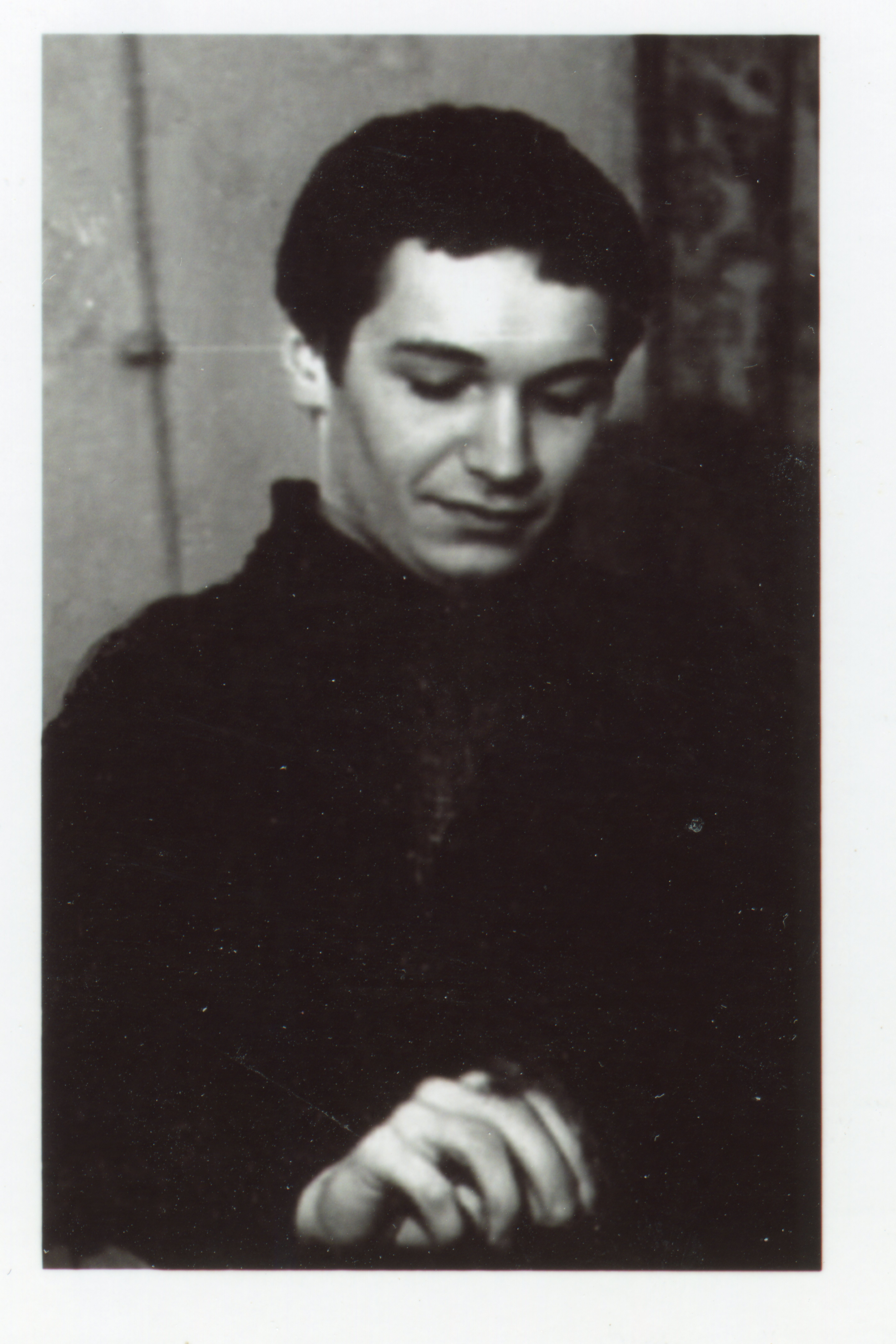 Portrait de Nikolaï Prorokov